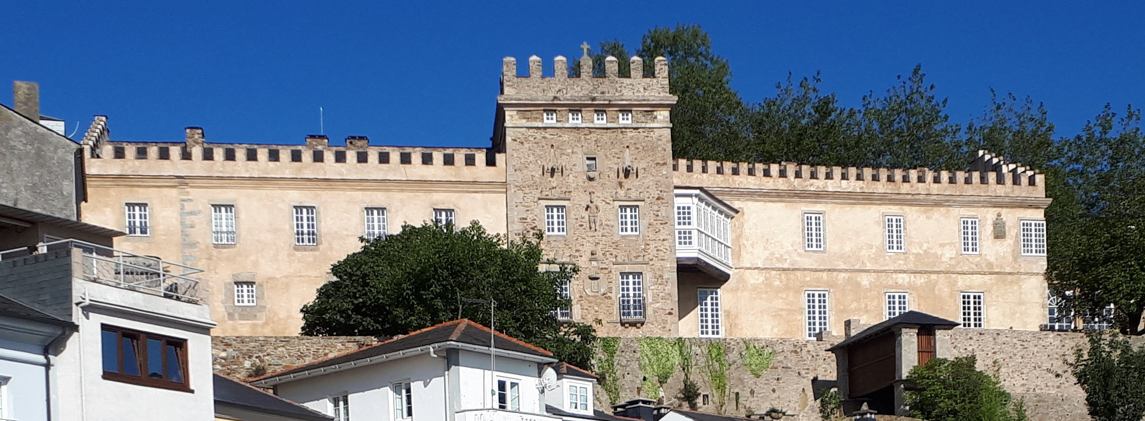 Palacio de los Pardo de Donlebún o Palacio de los Trenor en Figueras (Asturias - España). La edificación tiene dos cuerpos principales, de unos veinte metros de largo, que jalonan una torre central de planta cuadrada.[1]